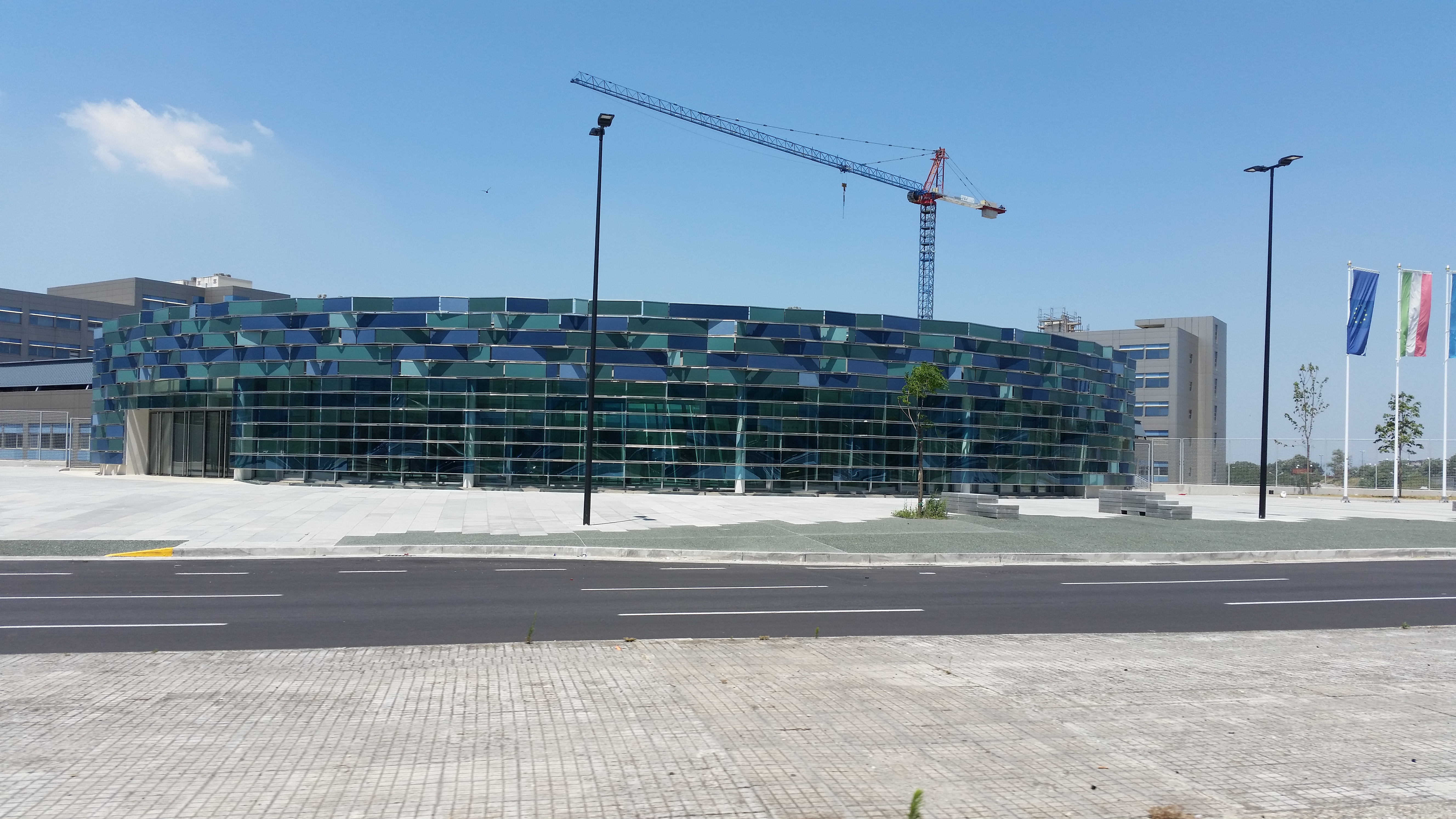 Ospedale del mare in costruzione.